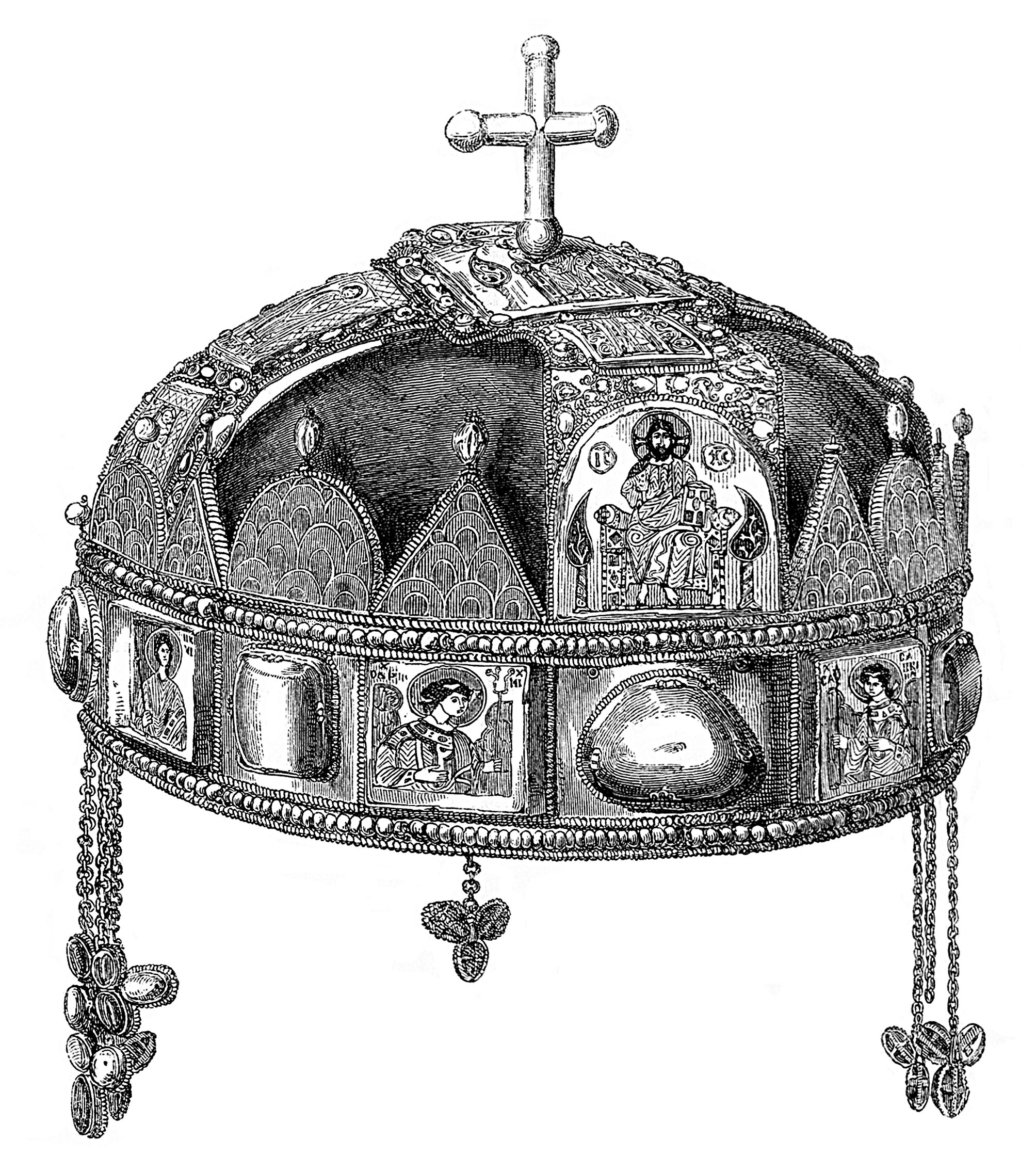 Bild (Holzschnitt) aus dem in derselben Kategorie befindlichen Artikel aus den Mittheilungen der kaiserl. königl. Central-Commission zur Erforschung und Erhaltung der Baudenkmale Band 2, 1857.